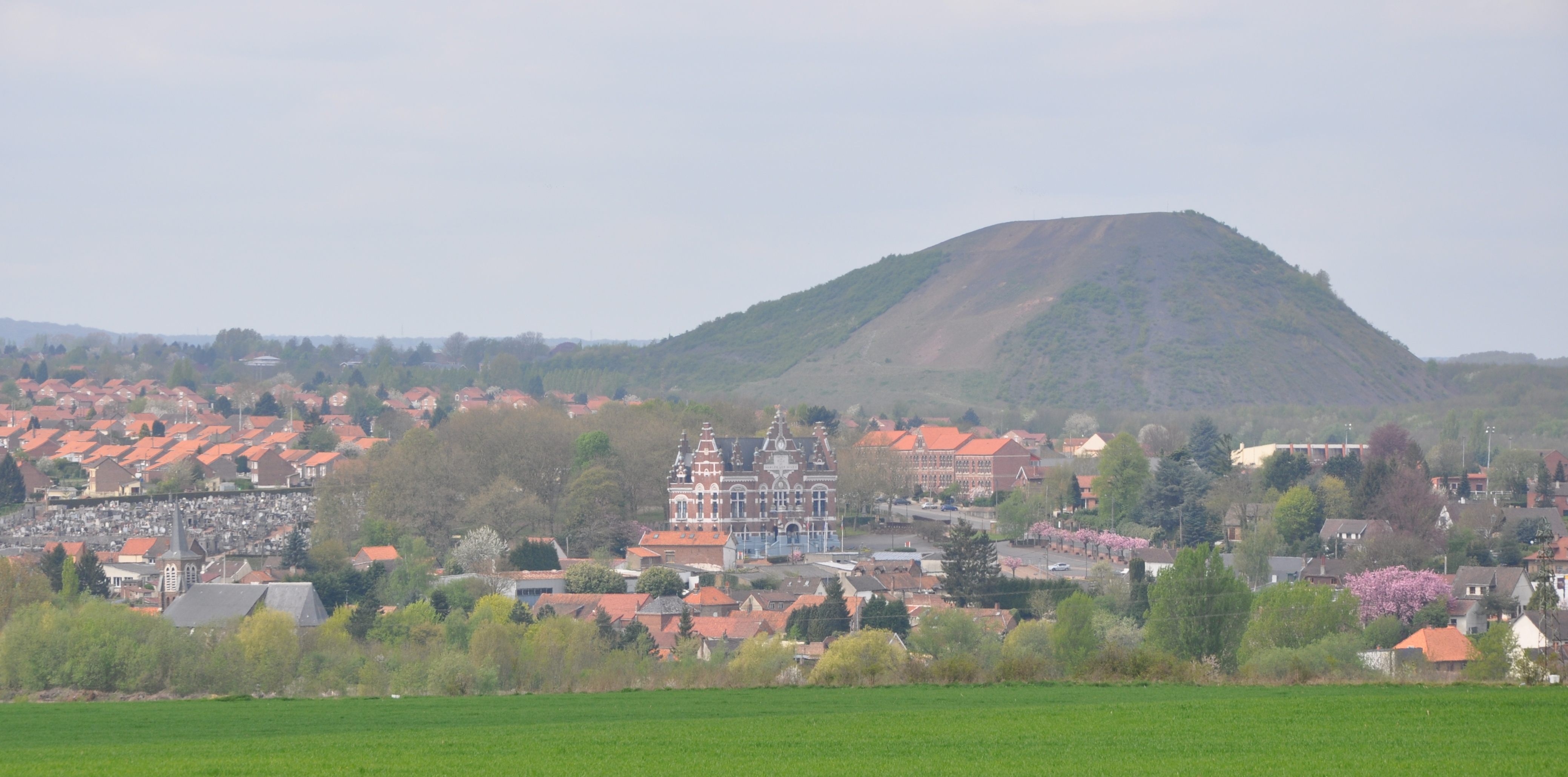 Vue sur le centre du village de Marles-les-Mines